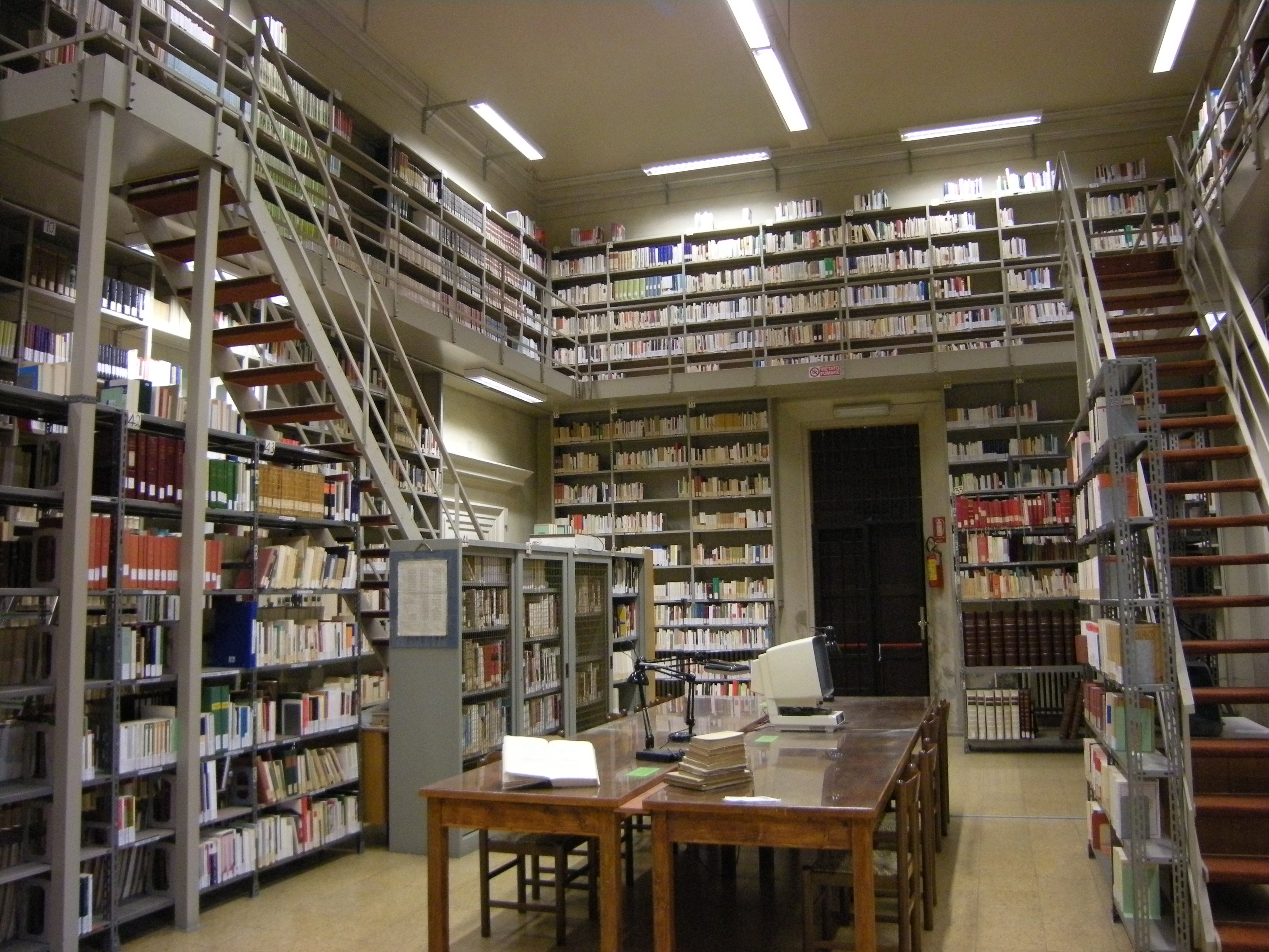 interno biblioteca 1